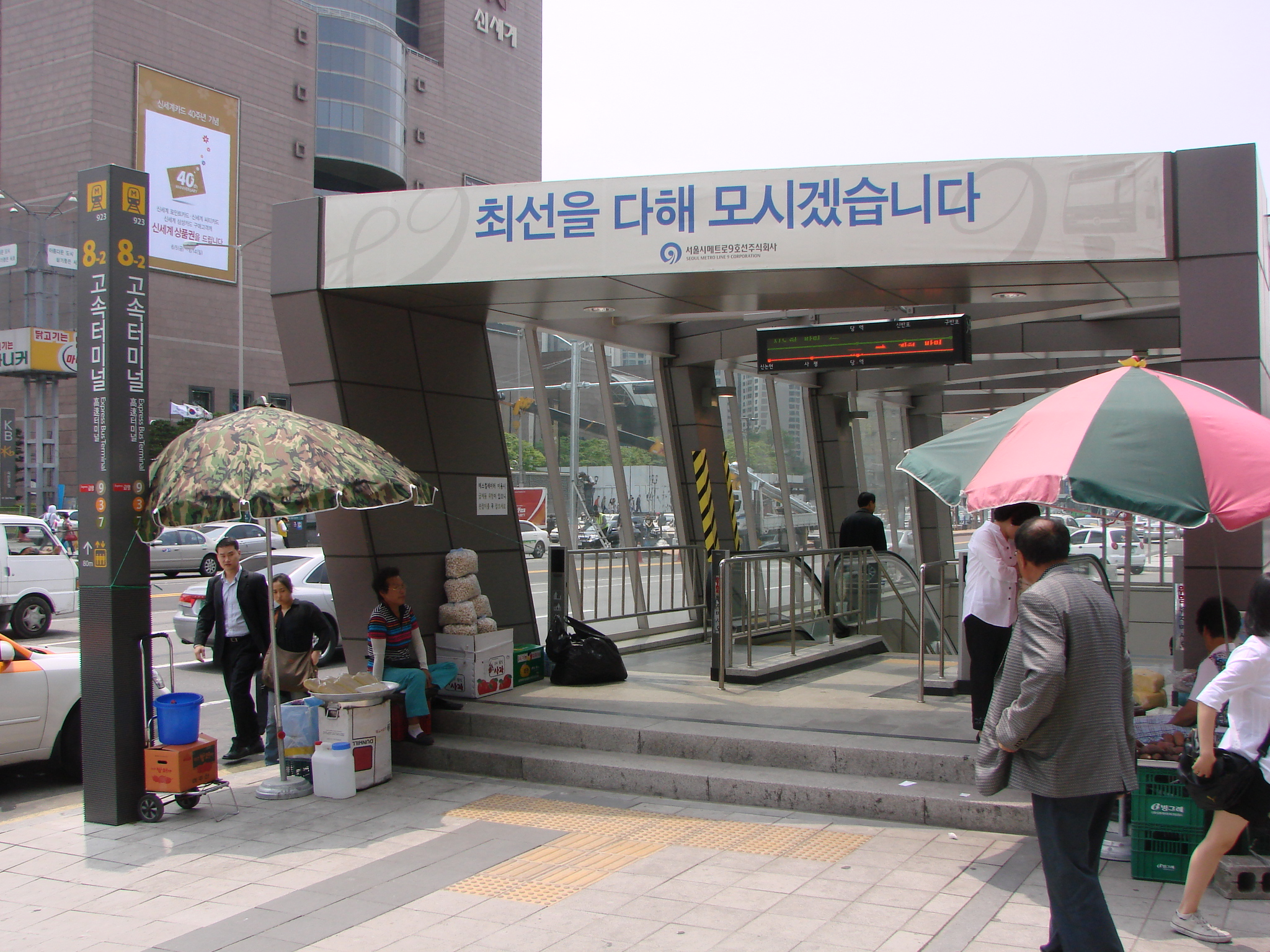 서울 지하철 9호선 고속터미널역 8-2번 출구